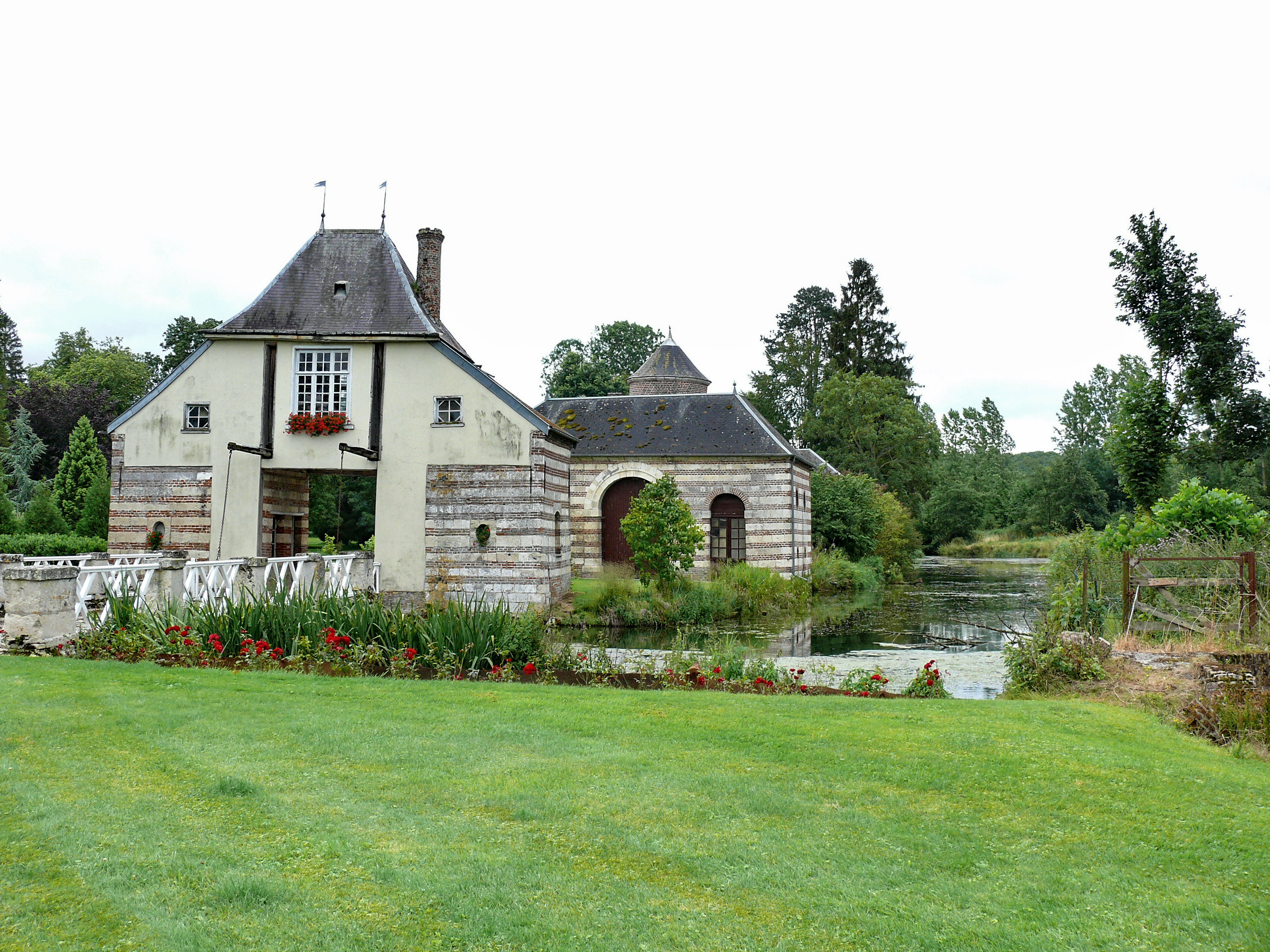 Conty : Les communs du Château de Luzières (fin du XVIIIe siècle)